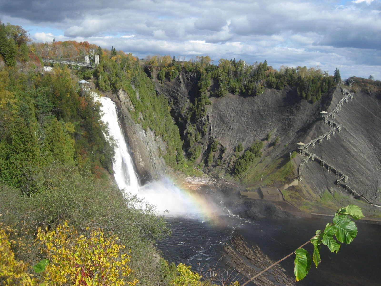 Une très belle chute de 83 m dans un cadre magnifique